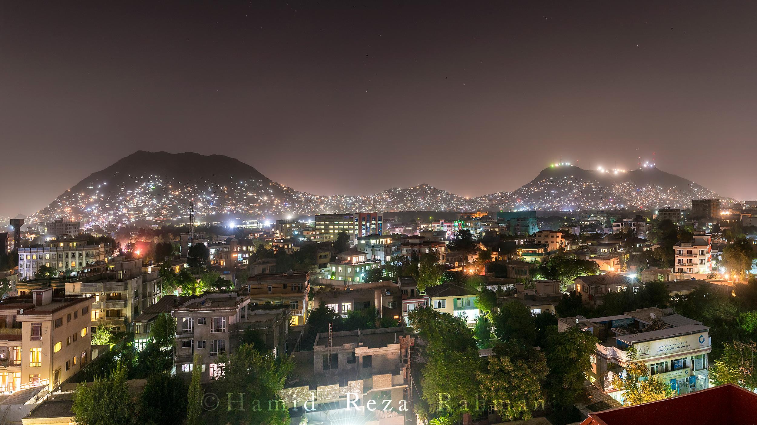 Kabul's Night